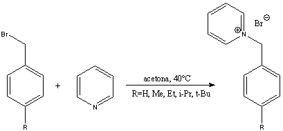 referencia baker-nathan